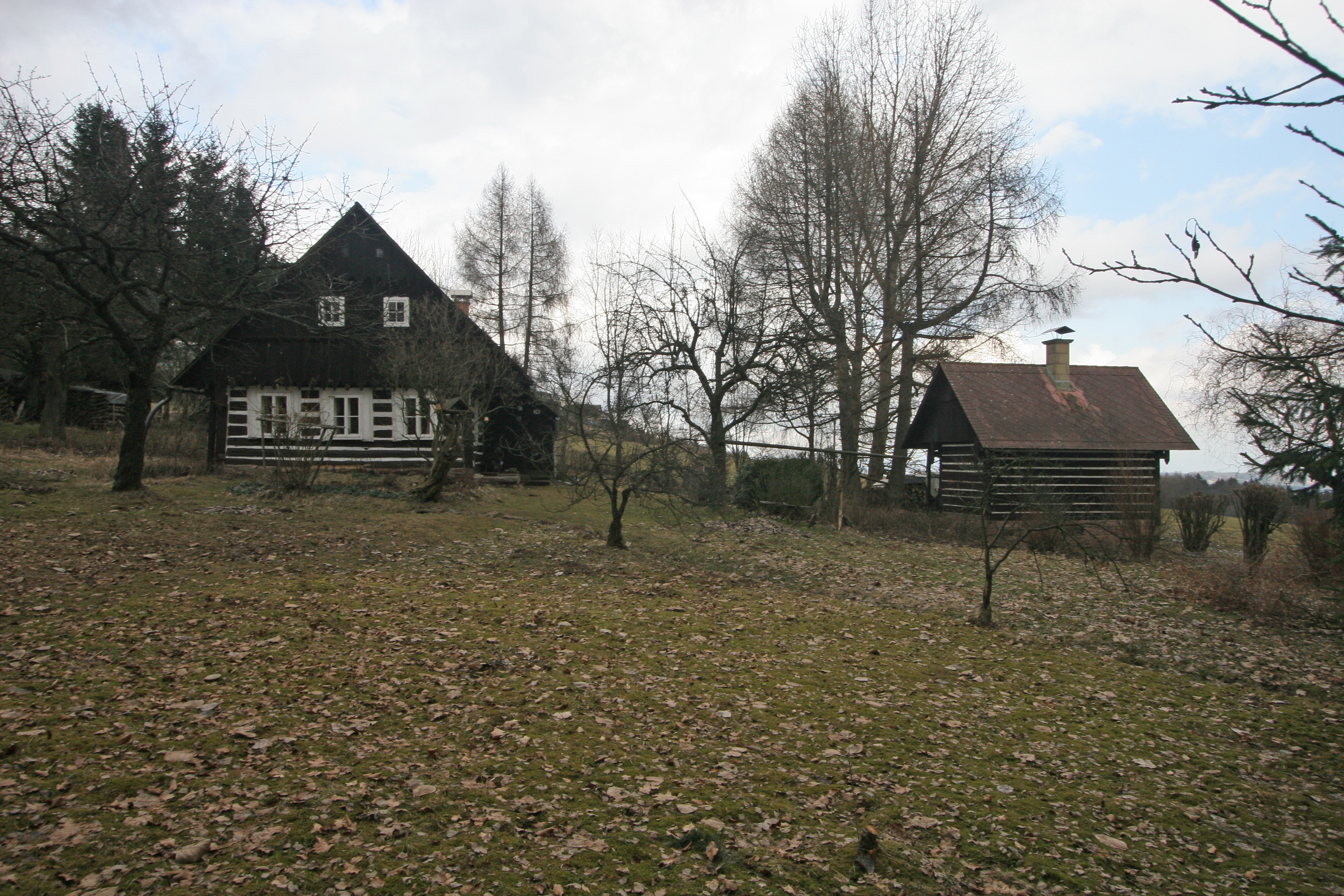 Košov čp. 30